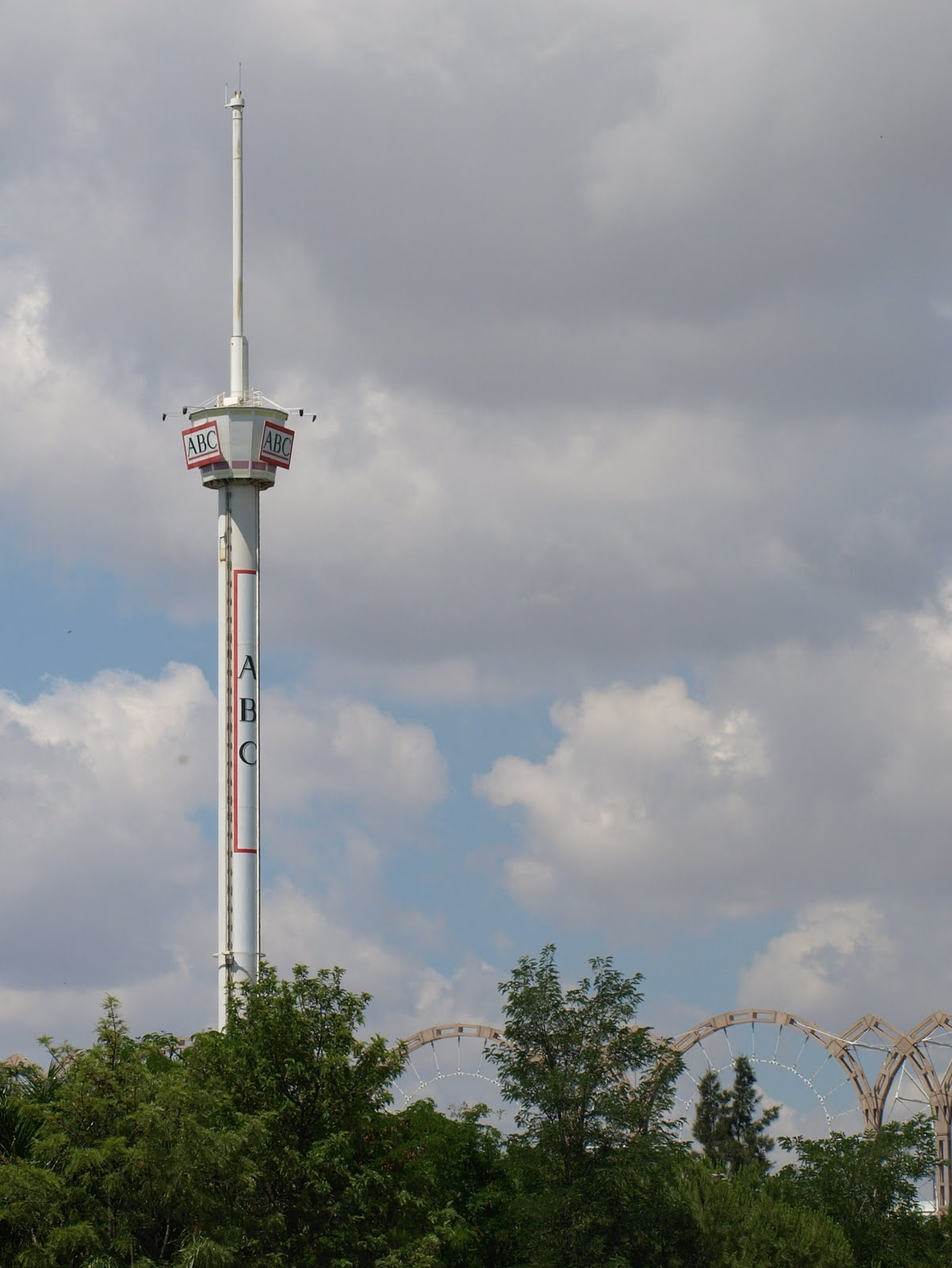 la 6º torre mas alta de España